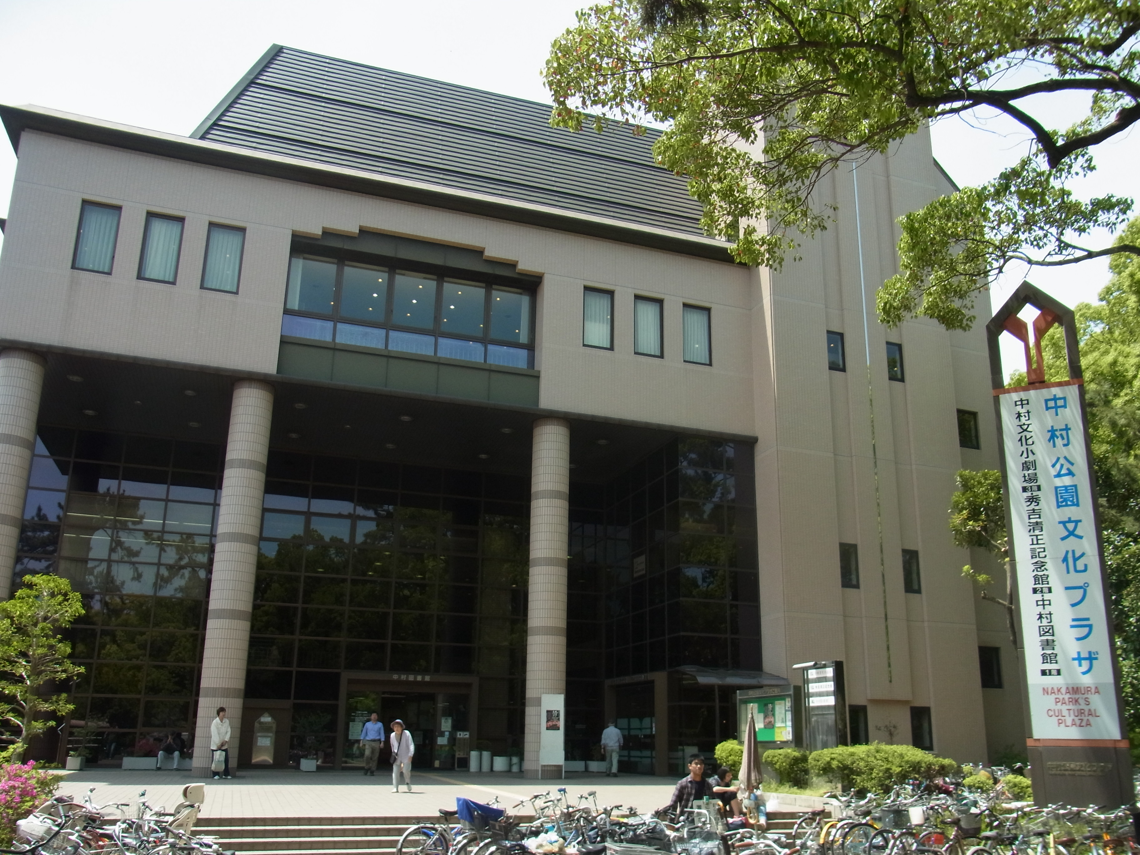 愛知県名古屋市中村区の中村公園文化プラザ（名古屋市中村図書館・秀吉清正記念館・中村文化小劇場）